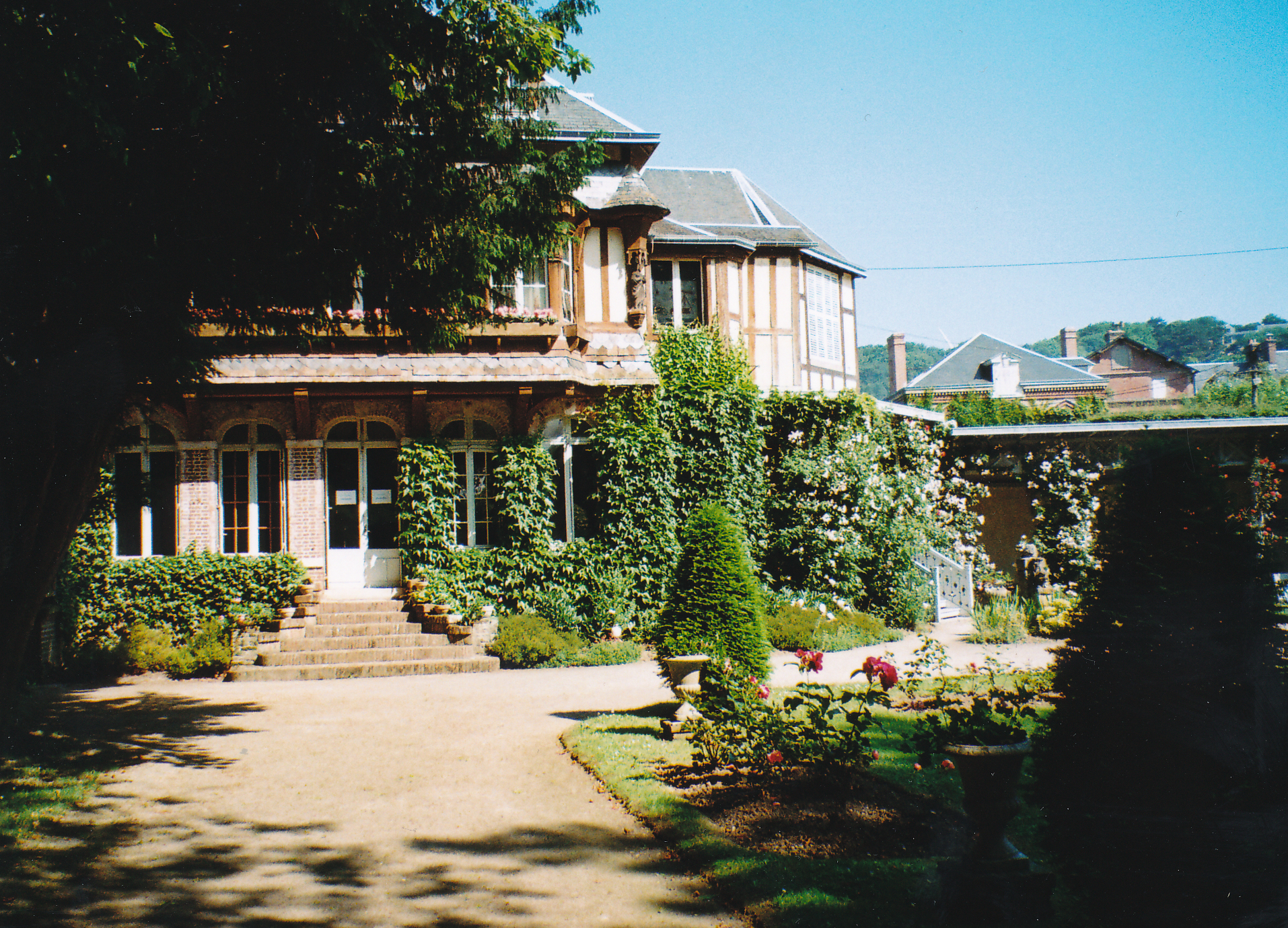 Vormaliges Wohnhaus (und heutiges Museum) des Schriftstellers Maurice Leblanc (Romanheld: Arsène Lupin) Datum: 06/2009 Urheber: Michael Pfeiffer Quelle: privates Fotoalbum des Urhebers